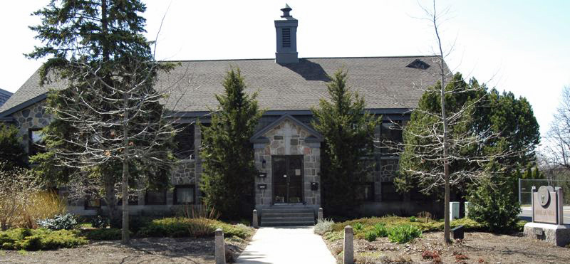 Hôtel de ville de Saint-Bruno-de-Montarville, rue Montarville. L'école municipale du début du siècle était située au 1439, rue Montarville. Elle sera par la suite reconstruite au 1585, immeuble actuellement occupé par l'hôtel de ville depuis les années 60.